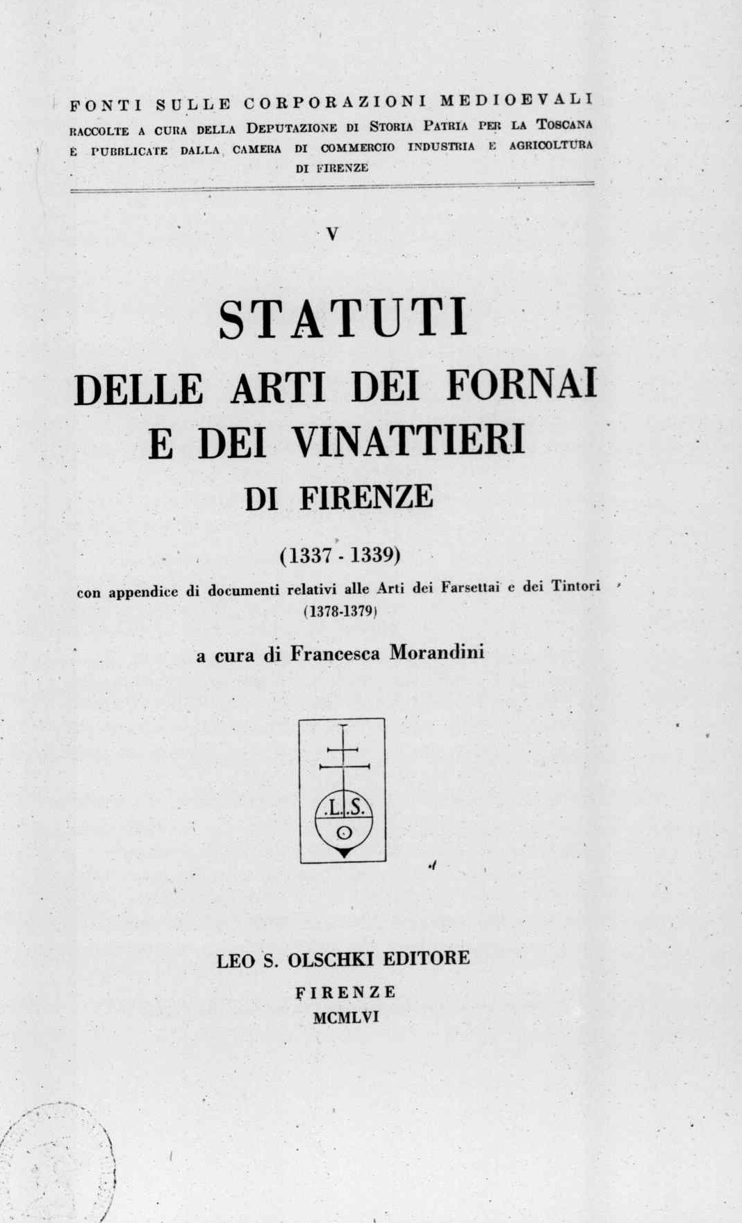 Frontespizio